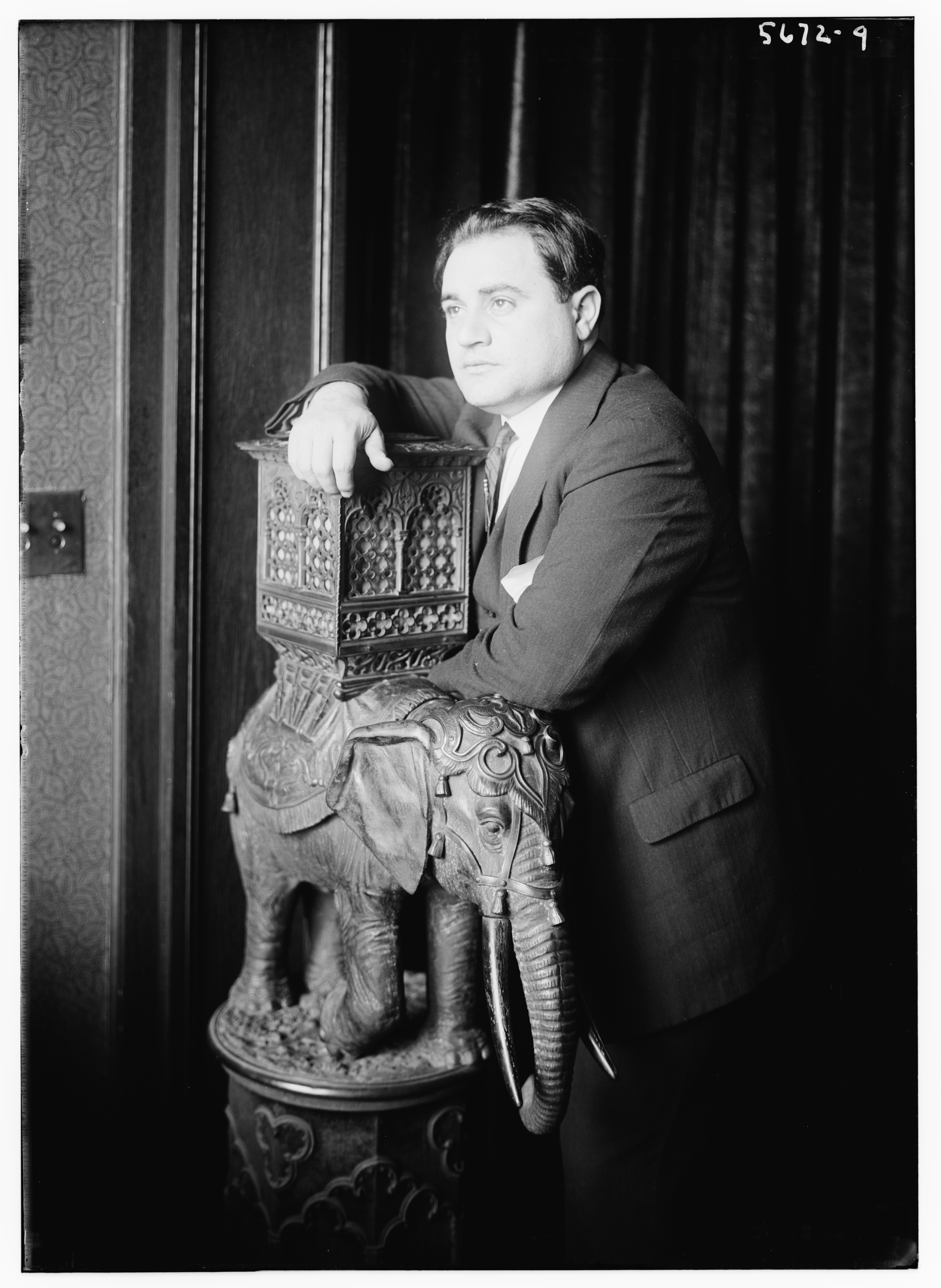 Italian tenor Beniamino Gigli